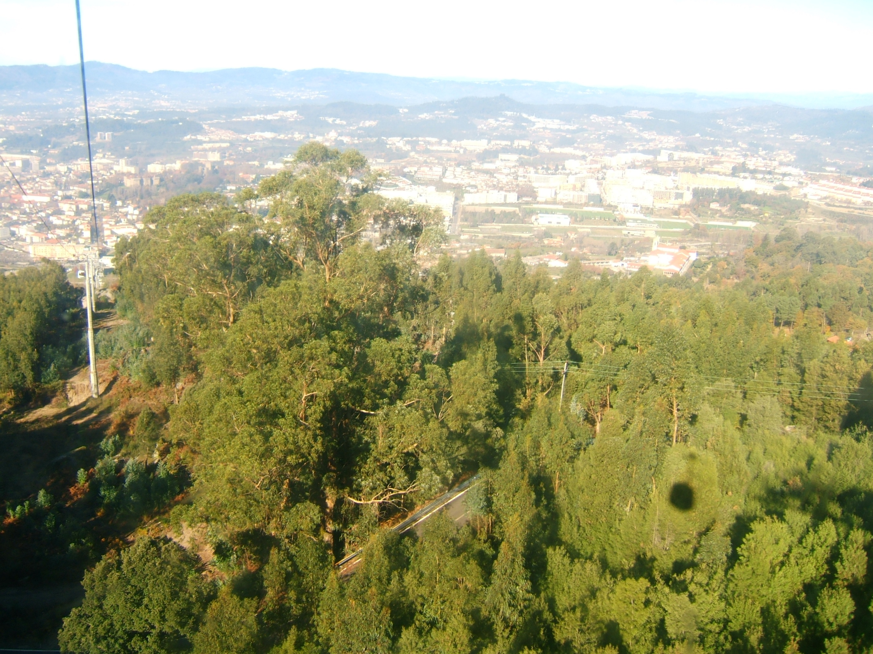 Estrada para a Penha visto do Teleférico.